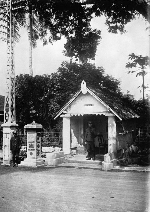 Foto. Het oude politieposthuis Kassin te Malang.